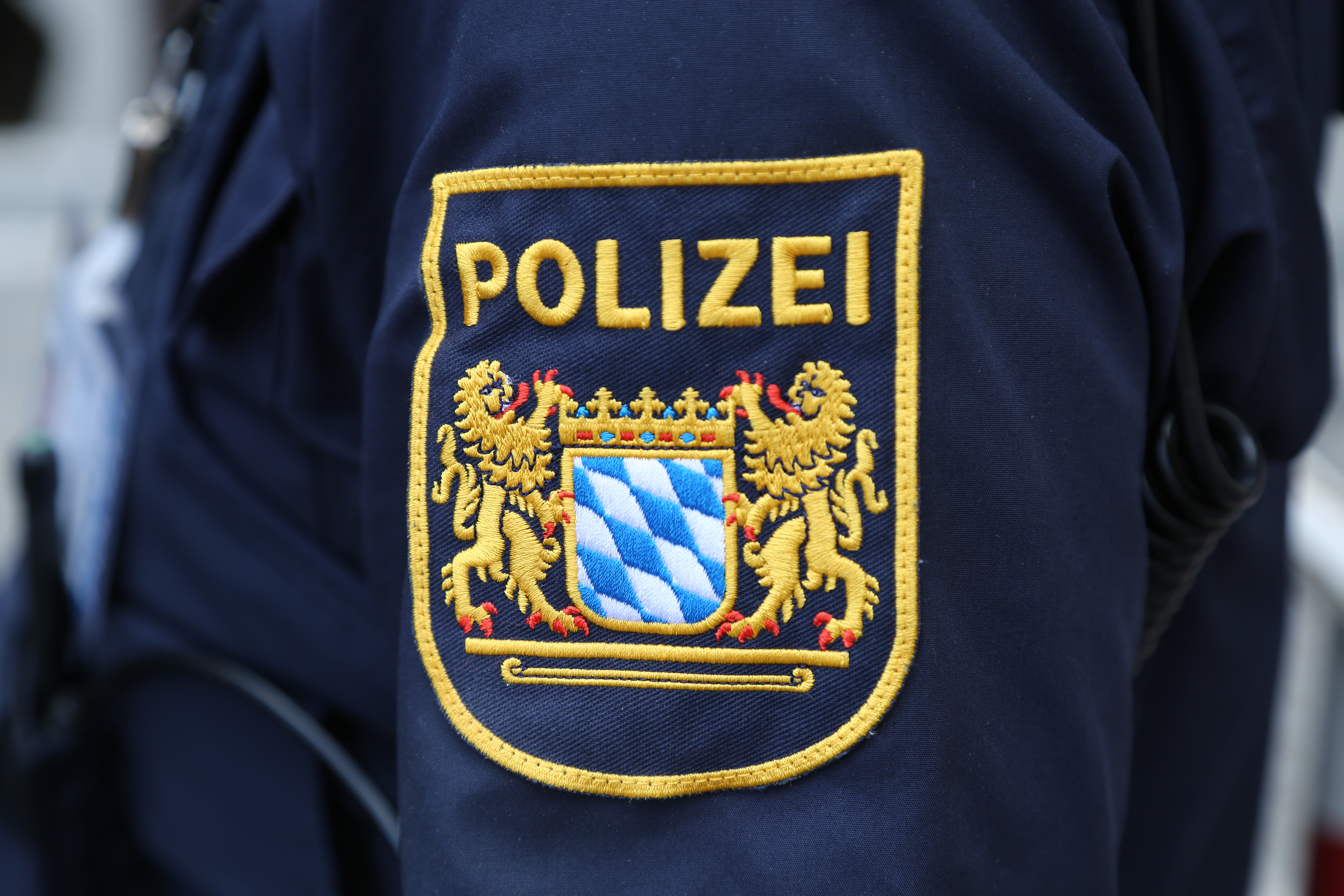 Schulterwappen der bayerischen Polizei auf blauer Uniform